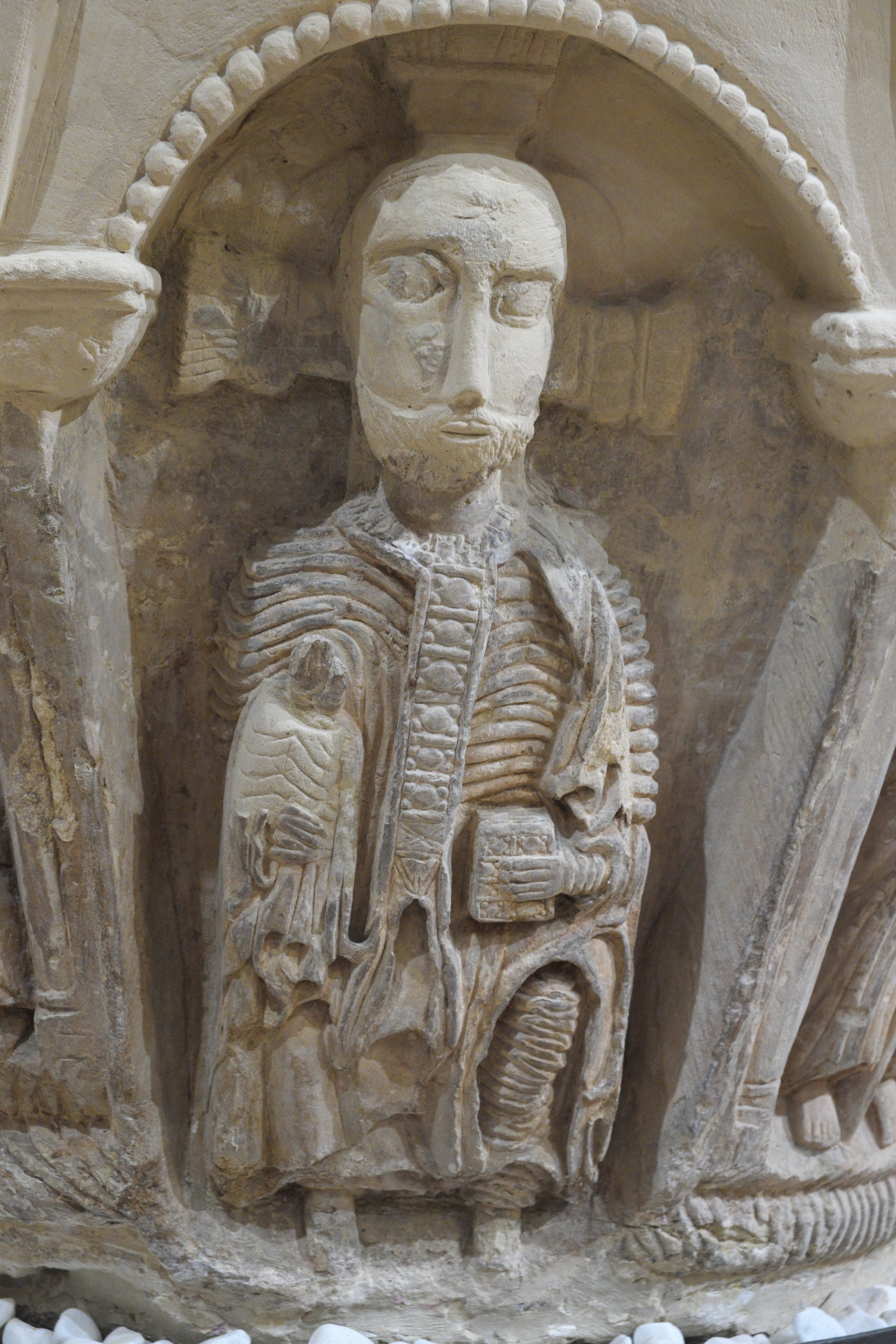 Kirche San Juan Bautista (Johannes der Täufer) in Moarves de Ojeda (Olmos de Ojeda) in der Provinz Palencia (Kastilien-León/Spanien), romanischer Taufstein (oberer Teil erneuert)